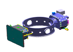 Vue d'artiste du Demonstration and Science Experiments